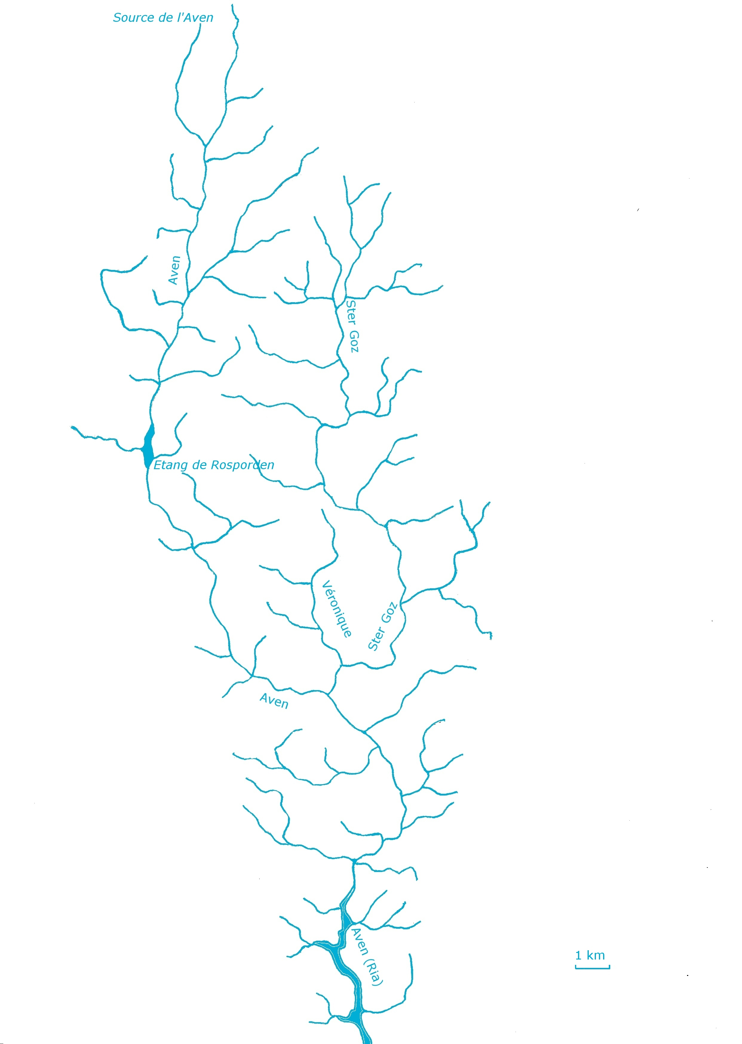 carte hydrographique de la rivière Aven et de ses affluents